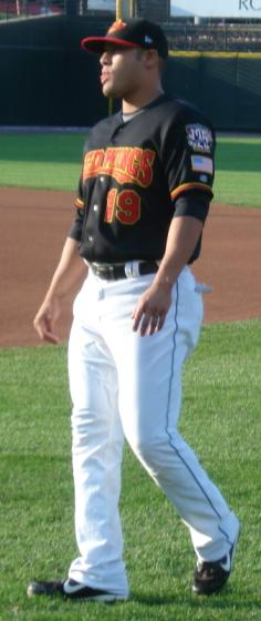 Sergio Santos 2008 06:16, 9 June 2008 . . Phil5329 . . 236×560 (21 KB)